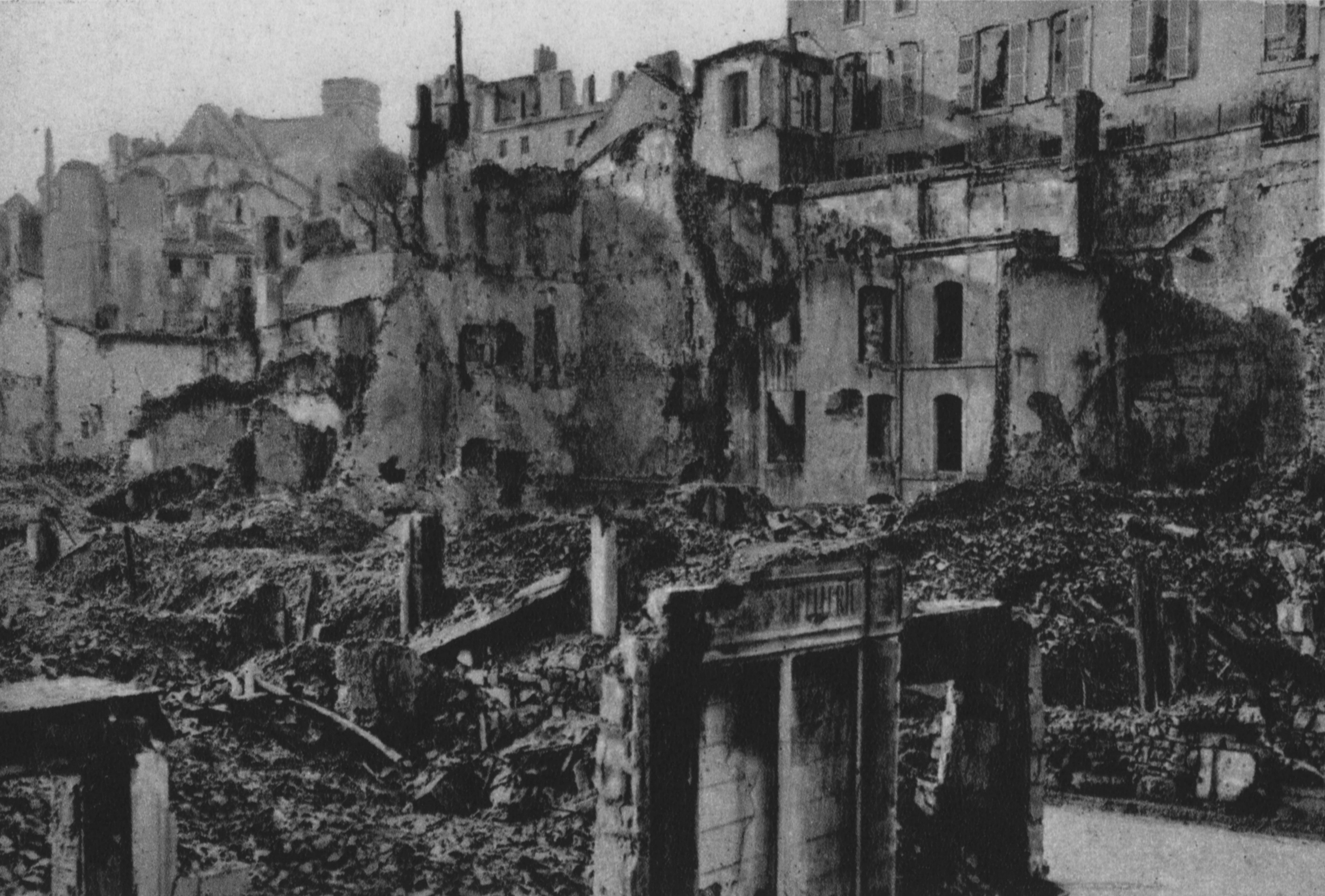 Verdun. Die rue Mazel und die rue St. Esprit (1916).